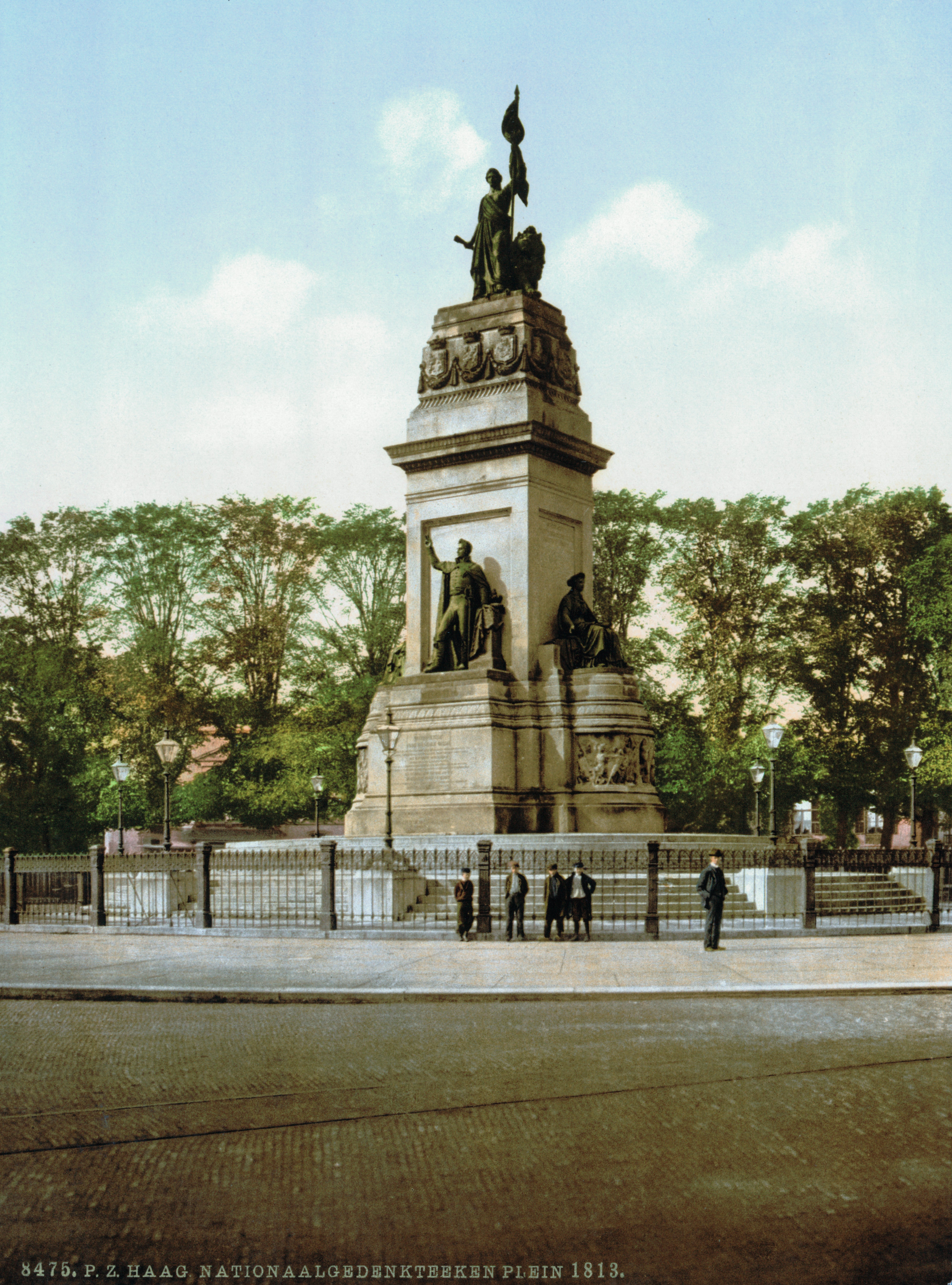 Den Haag - Nationaal gedenkteken Plein 1813